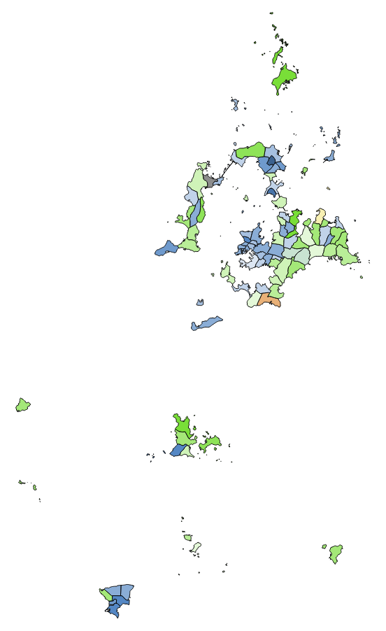 顏色對照表